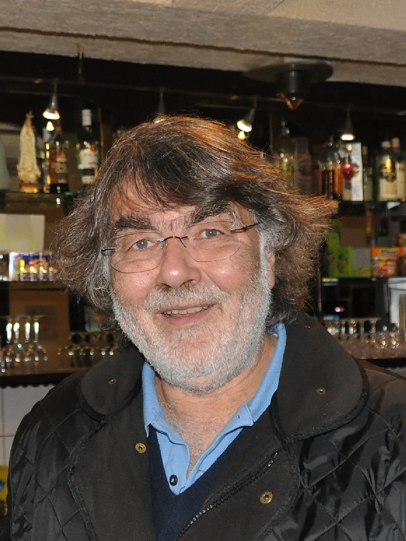 Reinhold Friedl in Cuxhaven 2012 Personality rights warningAlthough this work is freely licensed or in the public domain, the person(s) shown may have rights that legally restrict certain re-uses unless those depicted consent to such uses. In these cases, a model release or other evidence of consent could protect you from infringement claims.